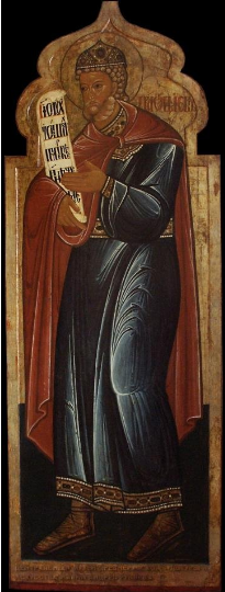 Праотец Иов. Икона из праотеческого чина главного иконостаса Спасо-Преображенского собора Соловецкого монастыря. Первая треть XVII века